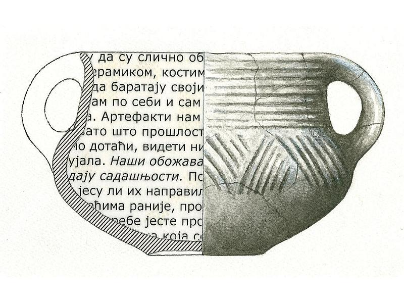 Logo (zaštitni znak) Centra za teorijsku arheologiju Filozofskog fakulteta Univerziteta u Beogradu.